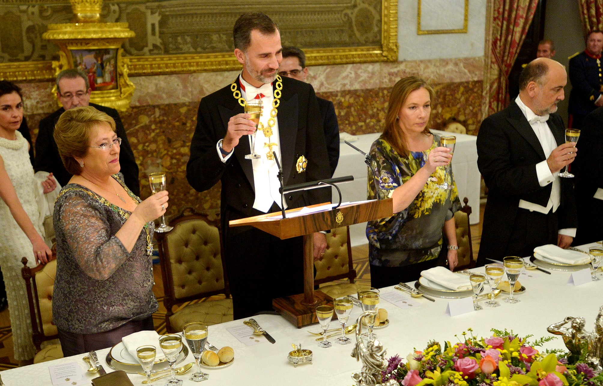 Michelle Bachelet junto a los Reyes de España